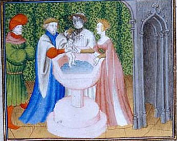 Dagobert I s milenkou Regnitrude a synem Sigebertem III